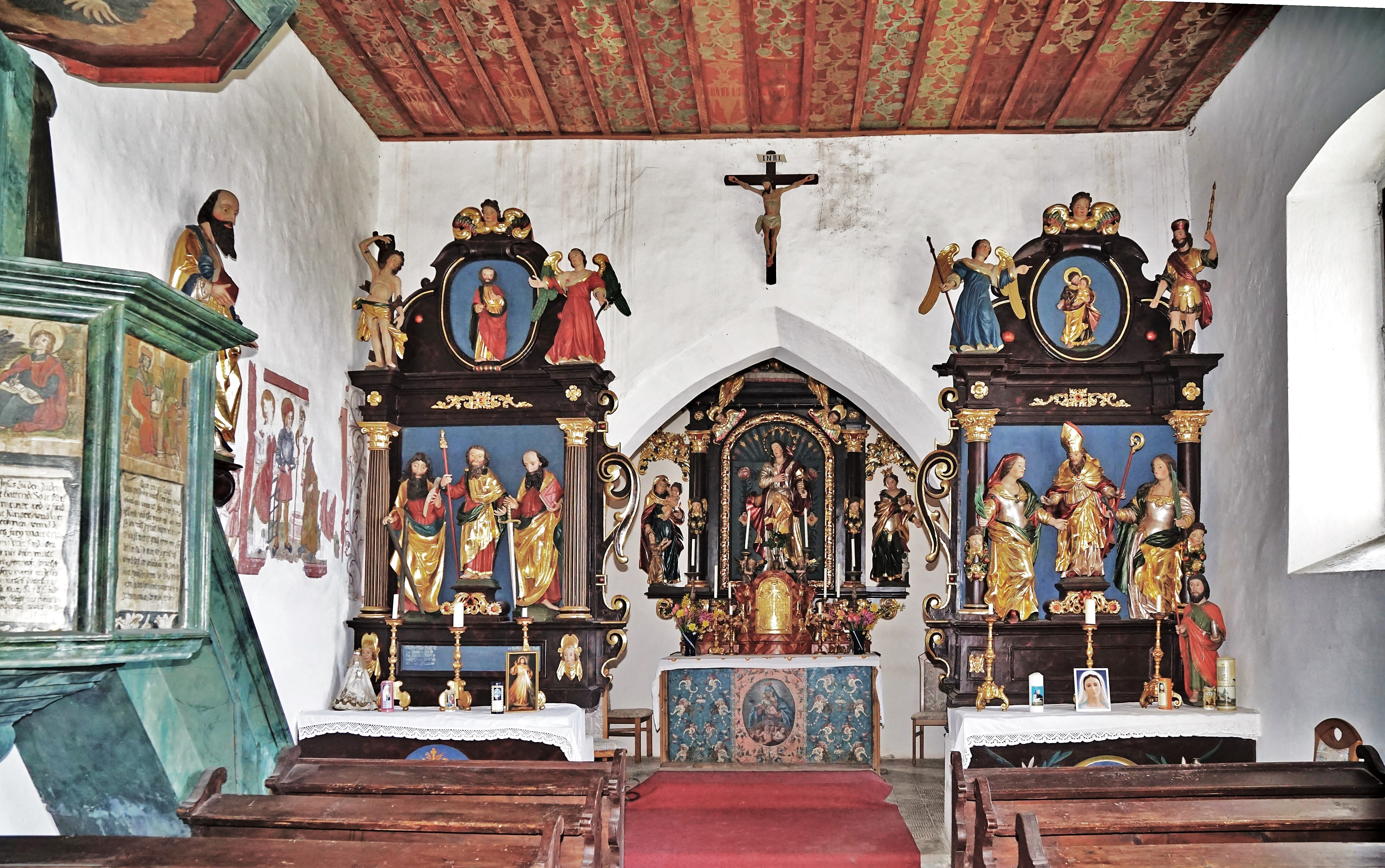 Kath. Filialkirche Hl. Thomas, Werschling (Himmelberg, Kärnten), Innenansicht